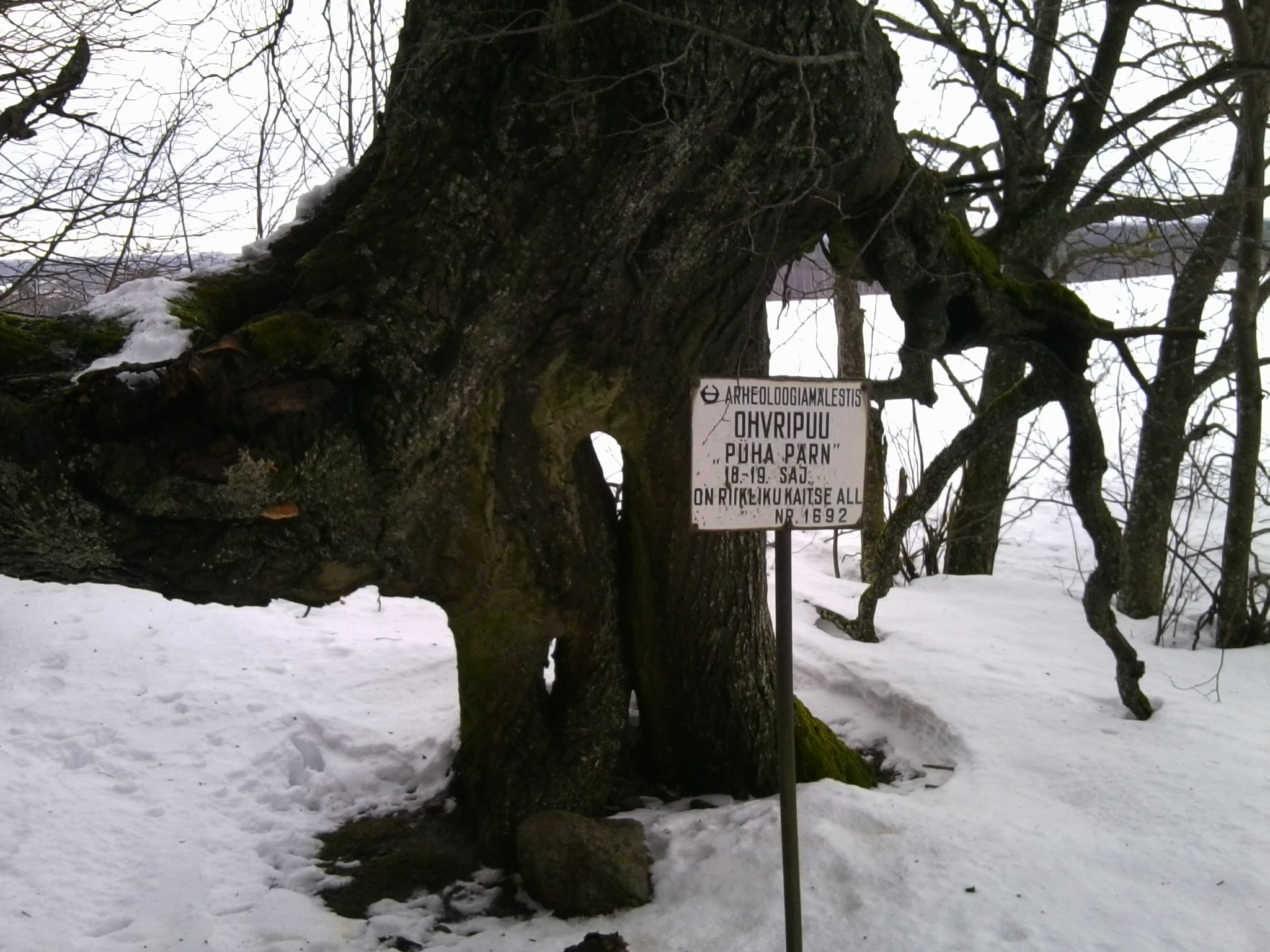 Ohvripärn. Vedu küla, Tartu vald